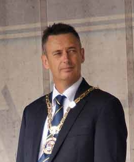 Tauranga mayor Stuart Crosby.